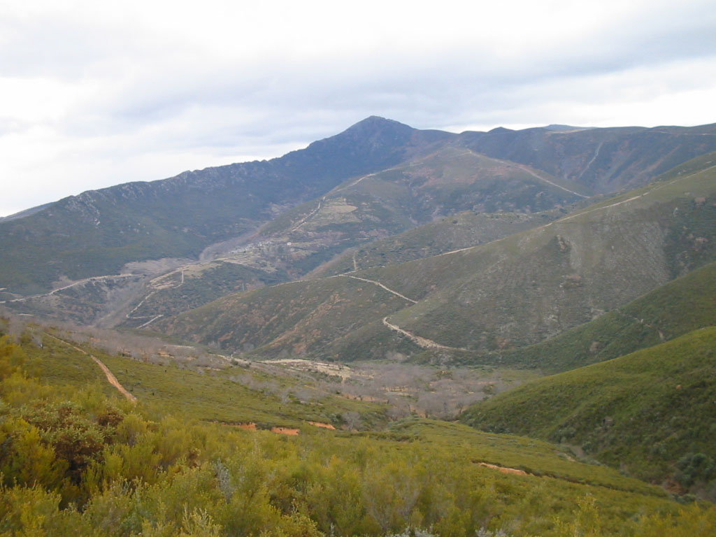 Vista de las montañas de La Cabrera desde Las Médulas (León, España).